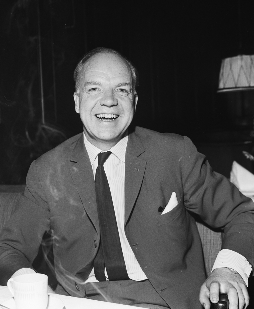 Henki Kolstad (født 3. februar 1915 i Kristiania, død 14. juli 2008) var en norsk skuespiller og regissør.